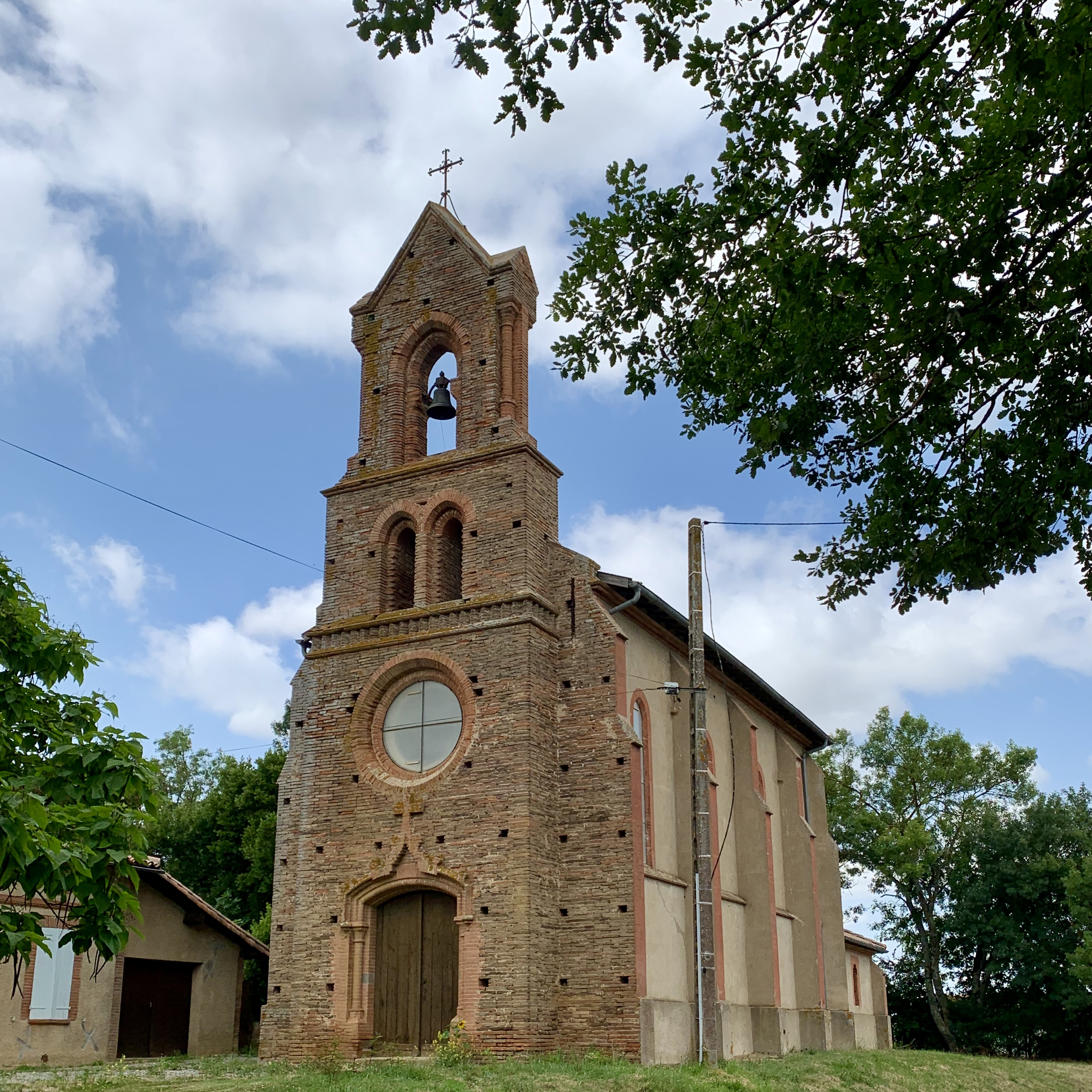 Chapelle Notre-Dame-de-Pitié de Saint-Thomas en Haute-Garonne (France)